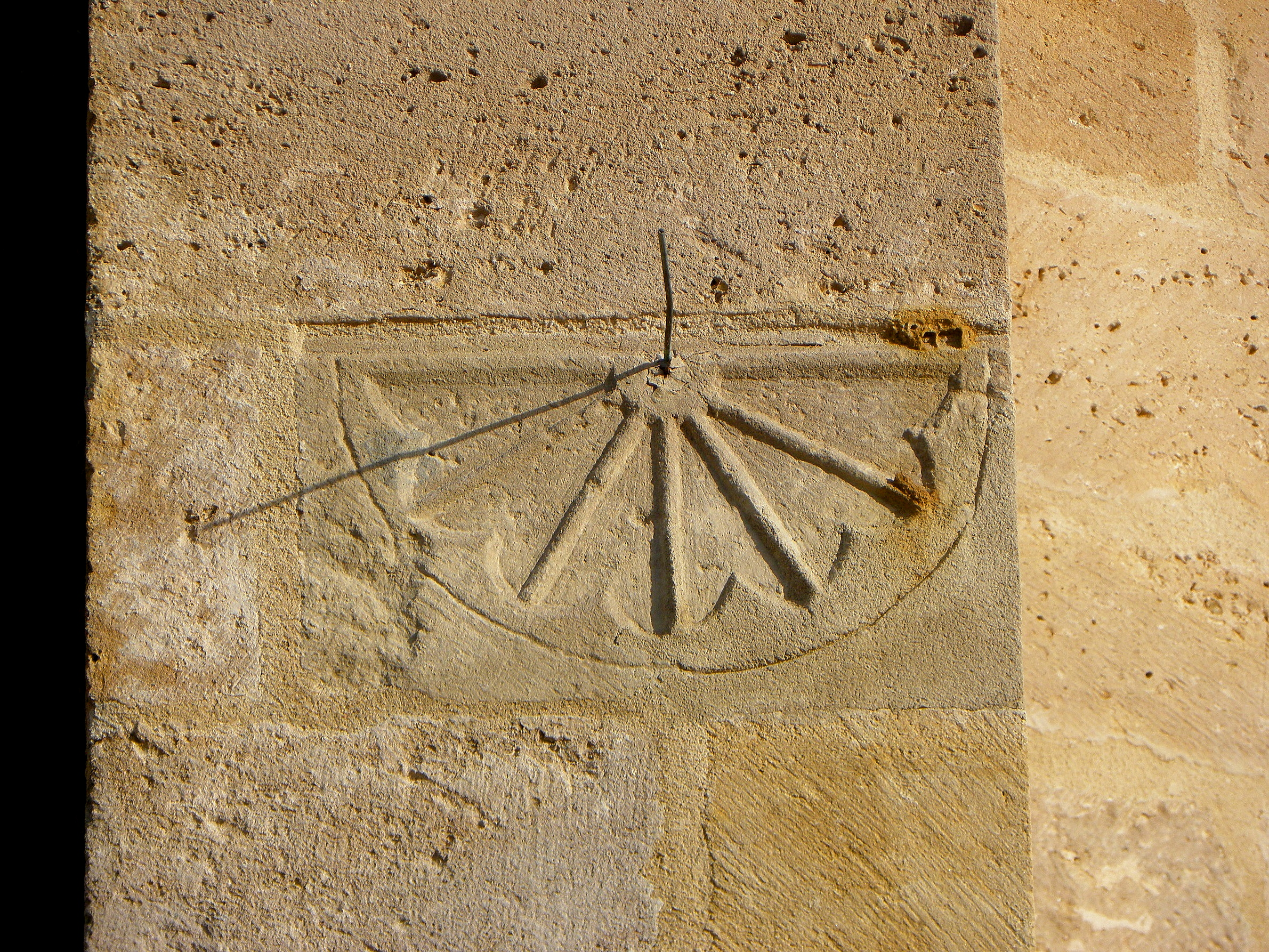 Collégiale Notre-Dame d'Uzeste (33). Cadran solaire.